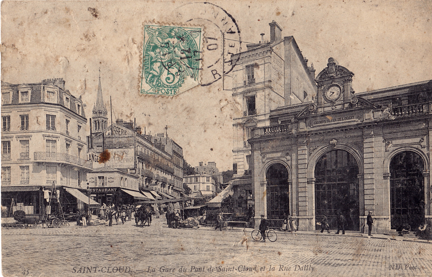 Carte postale ancienne éditée par ND à Paris, n°45 :SAINT-CLOUD - La